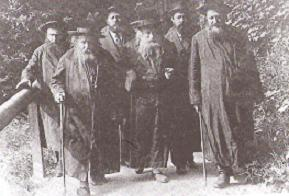 מימין לשמאל: מאיר אלתר, he:אברהם מרדכי אלתר, he:חנוך צבי הכהן לוין, he:ישראל אלתר